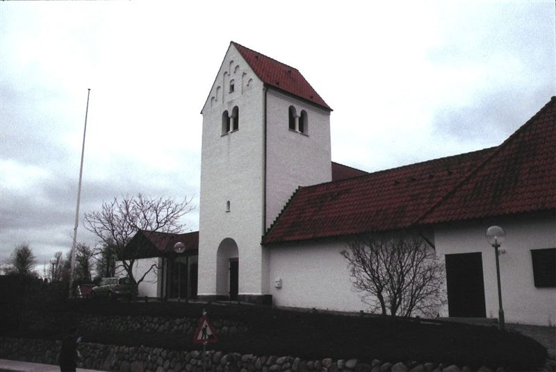 Nærum Kirke i Danmark. Nærum kirke